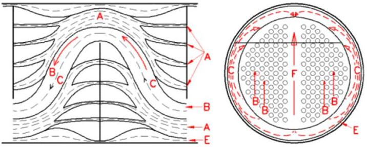 Distribucion de las corrientes en un intercambiador de Calor